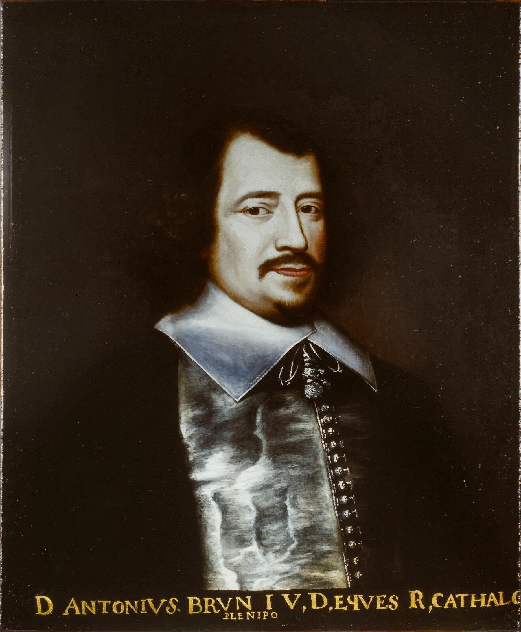 Antony de Brun (1599-1654), 1648-1649 Münster, Historisches Rathaus Münster (Friedenssaal)